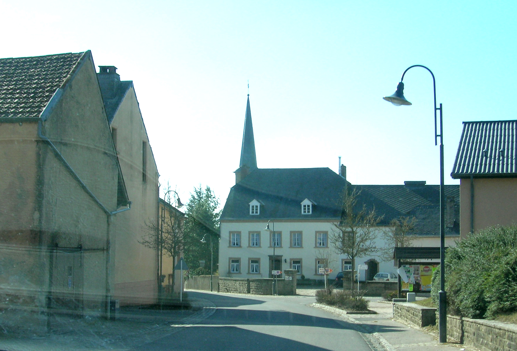 Steeën